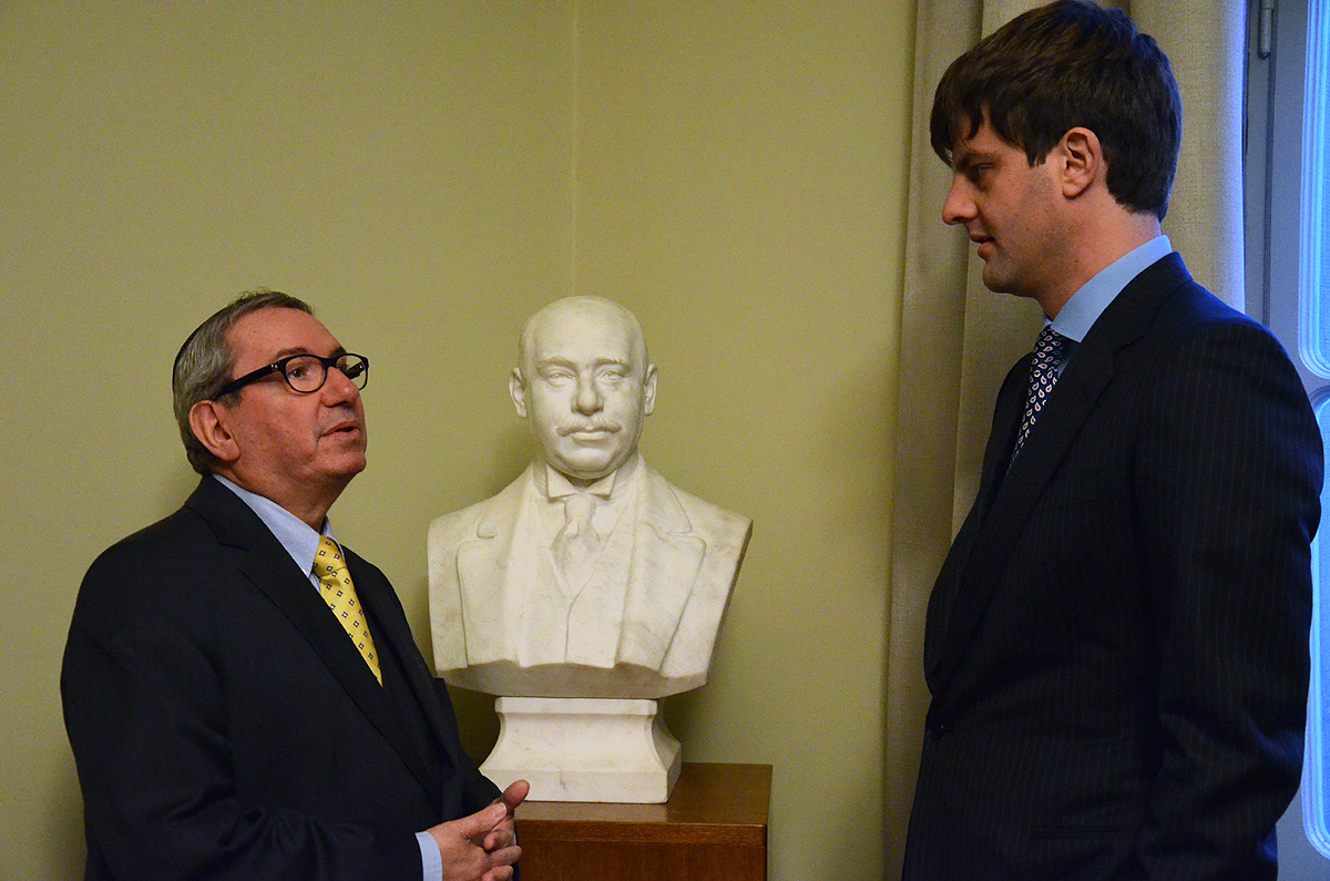 Zur Eröffnung der Ausstellung Israel Alter - der letzte Kantor von Hannover im Rahmen der Herbsttage der Jüdischen Musik führte der Ehrenpräsident der Siegmund-Seligmann-Stiftung, Andor Izsák (links, hier vor der Büste Siegmund Seligmanns), den Erbprinzen von Hannover, SKH Ernst August persönlich durch die Räumlichkeiten der Villa Seligmann ...